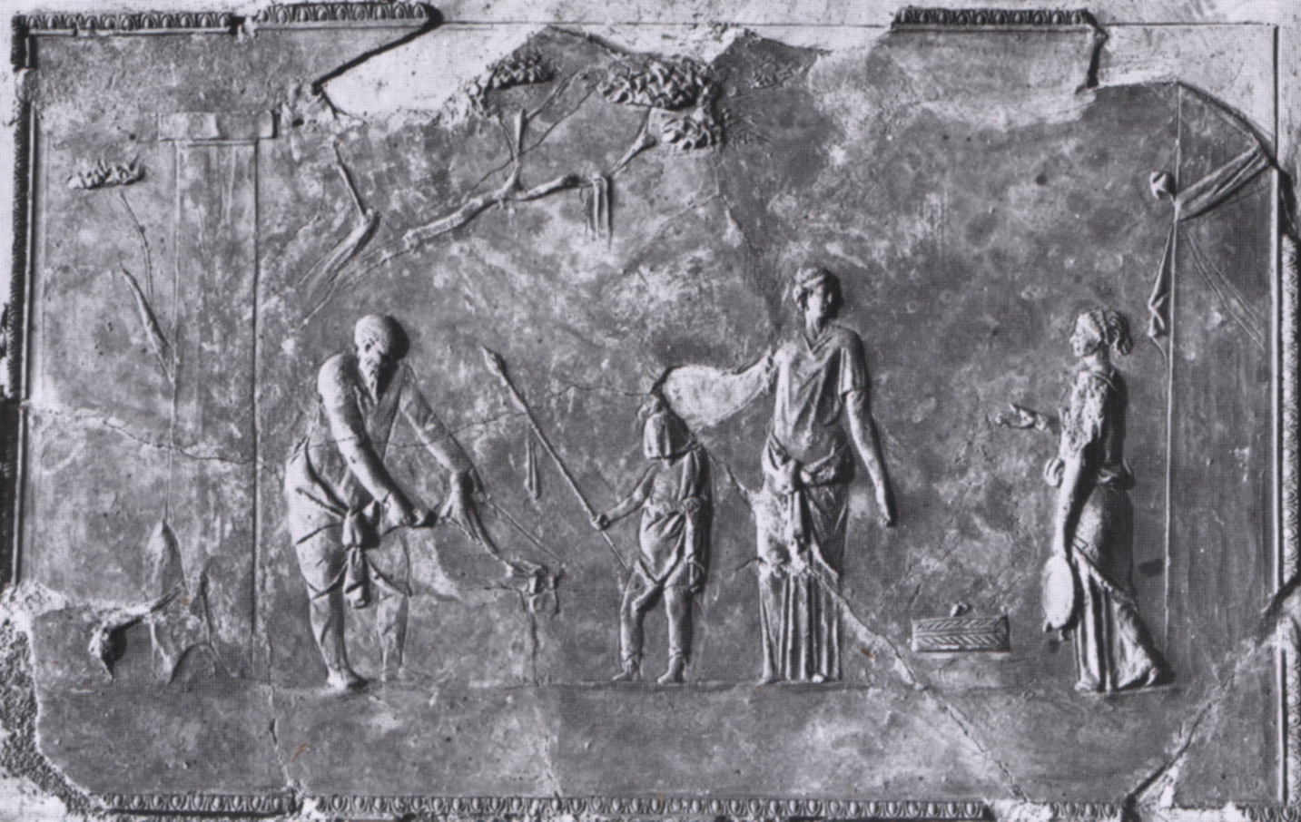 Casa della farnesina, stucco con scena di iniziazione dionisiaca, cubicolo D